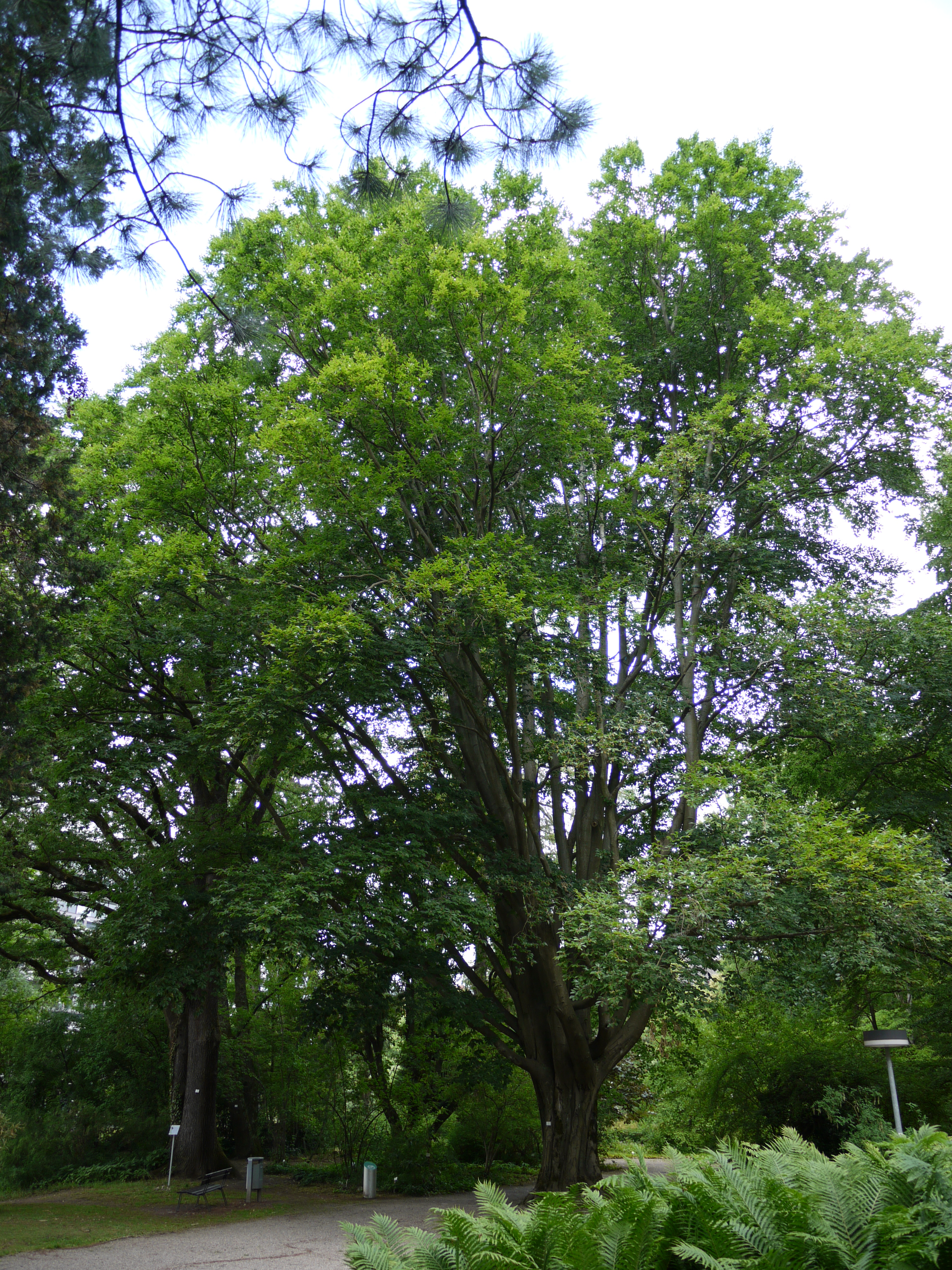 Orientbuche Fagus orientalis im Botanischen Garten Freiburg i. Brsg. Habitus.